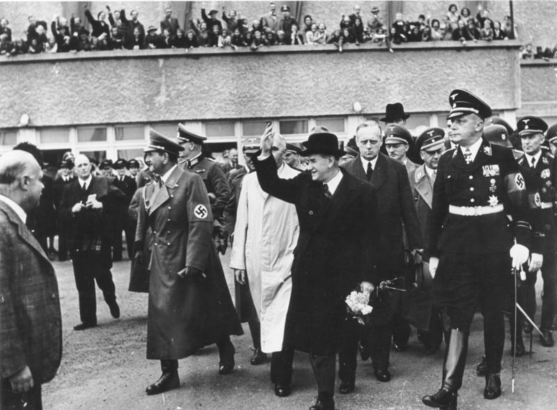 München, Ankunft [Abflug!] des franz. Ministerpräsidenten 29.-30.9.1938